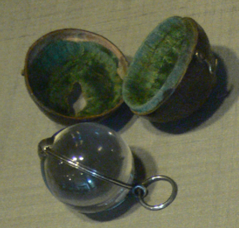 „Kühlkugel“ mit Futteral; Bergkristall, Silber, Leder; Deutschland um 1500 Kunstgewerbemuseum Berlin, Inv. Nr. F 502